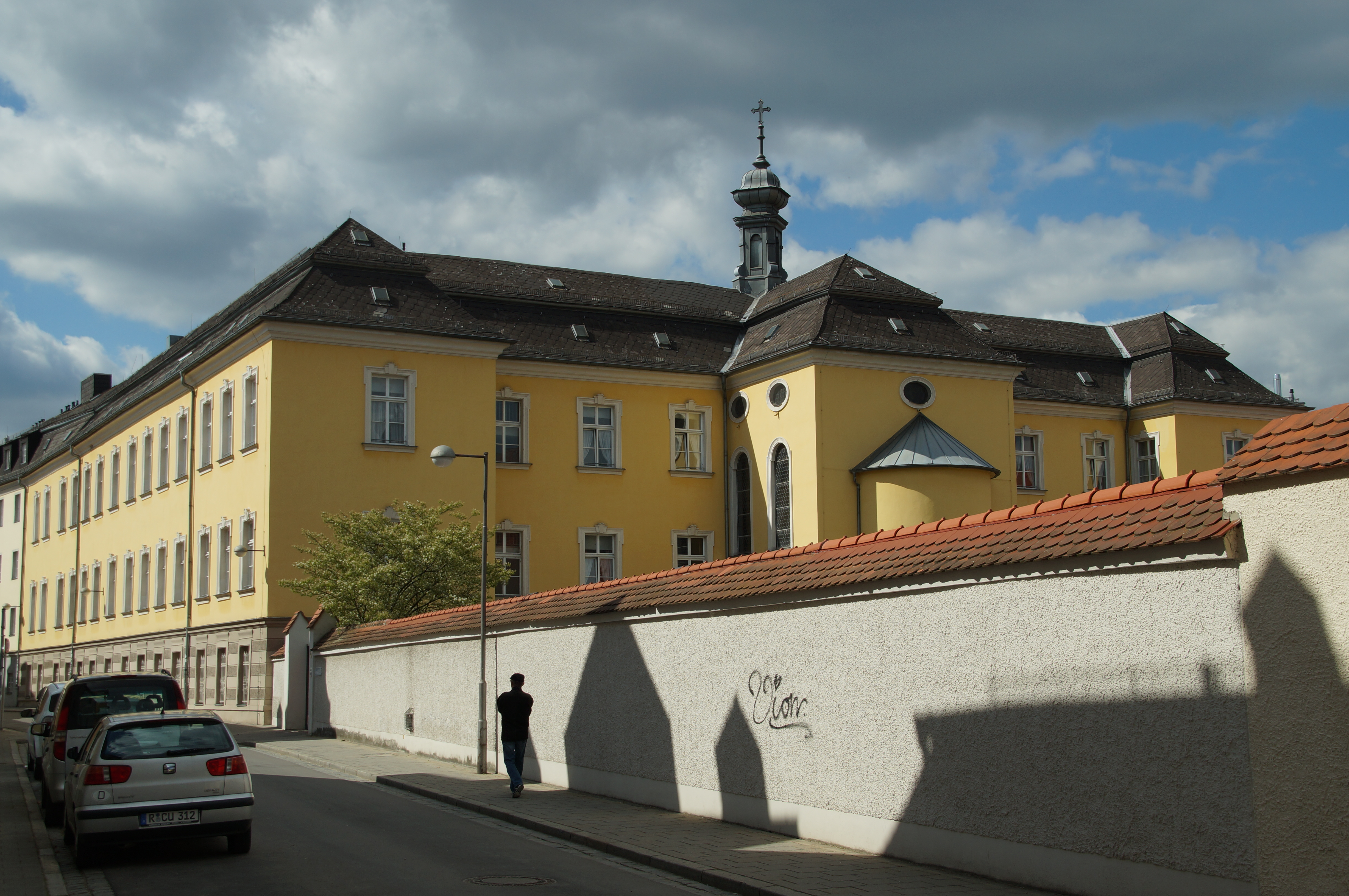 Bürgerstift St. Michael, ehemals Gelbes Haus, seit 1833 katholische Bruderhausstiftung, viergeschossige Vierflügelanlage mit Walmdächern, spätbarock, um 1720 von Johann Michael Prunner als Dreiflügelanlage errichtet, 1893/94 aufgestockt, Ostflügel 1893-94 mit Hauskapelle St. Michael, Saalbau mit eingezogener Apsis, Neurokoko This is a photograph of an architectural monument.